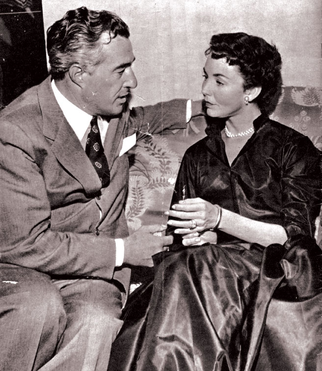 Vittorio De Sica e Jennifer Jones a colloquio durante la lavorazione di "Stazione Termini" (1952)